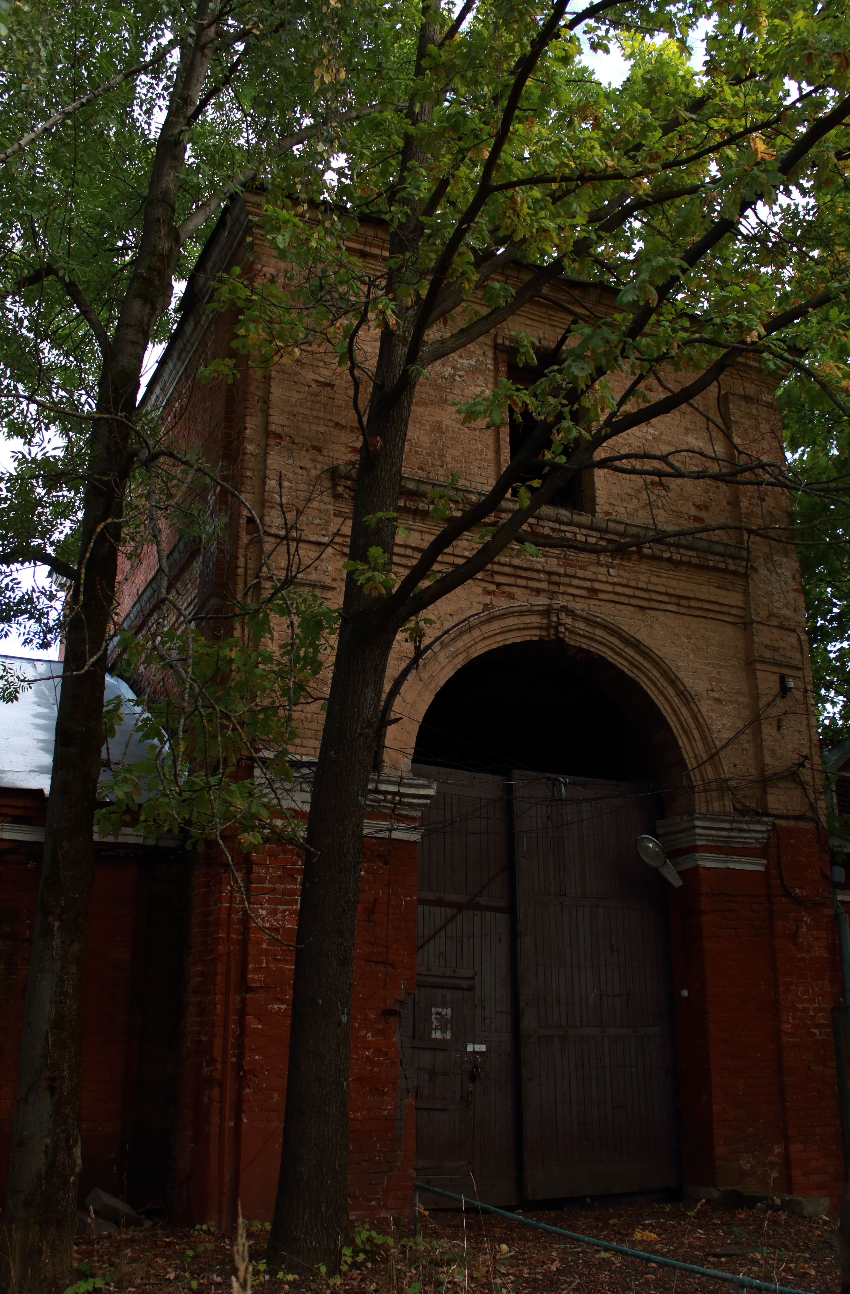 Конный двор: Профсоюзная ул., дом 123А, строение 7, Ясенево, Юго-Западный округ, Москва